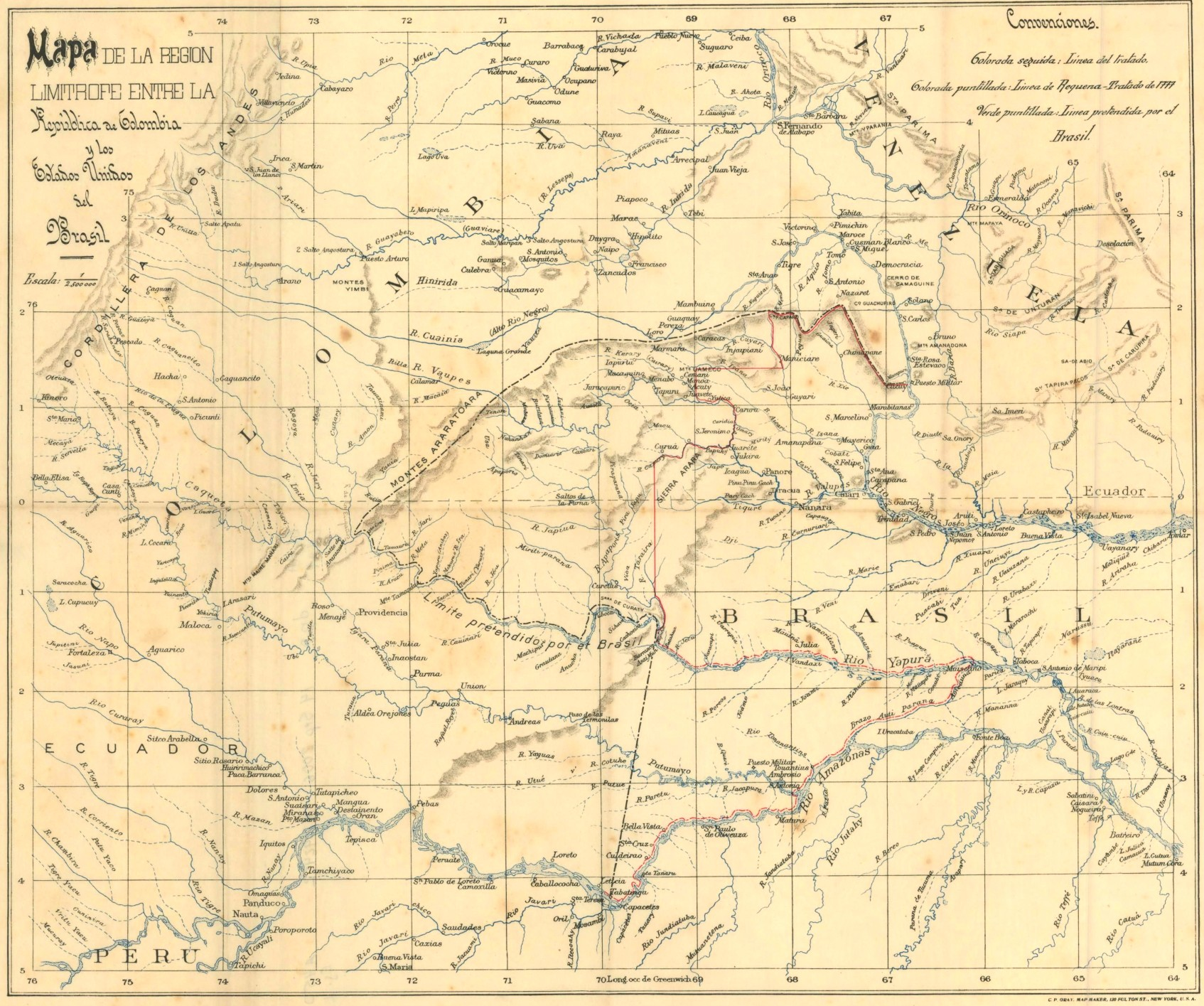 Mapa de la región limitrofe entre la República de Colombia y los Estados Unidos de Brasil. Descripción de hidrografía, relieve, trazado limítrofe entre Colombia y Brasil con cuadro de convenciones que establece tres tipos de fronteras, de acuerdo a tratados.